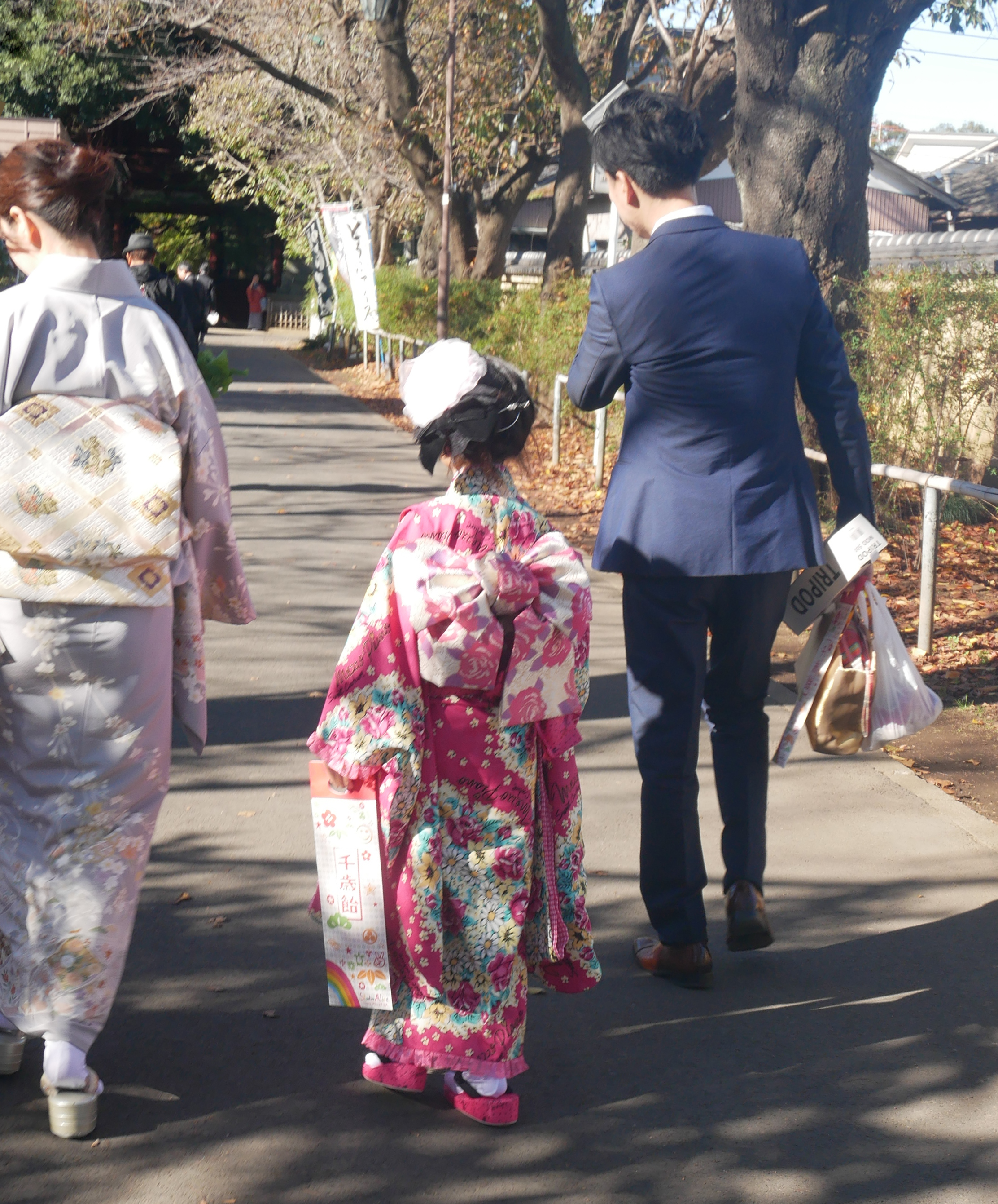 千歳飴を持つ少女。松戸市・本土寺の参道にて。